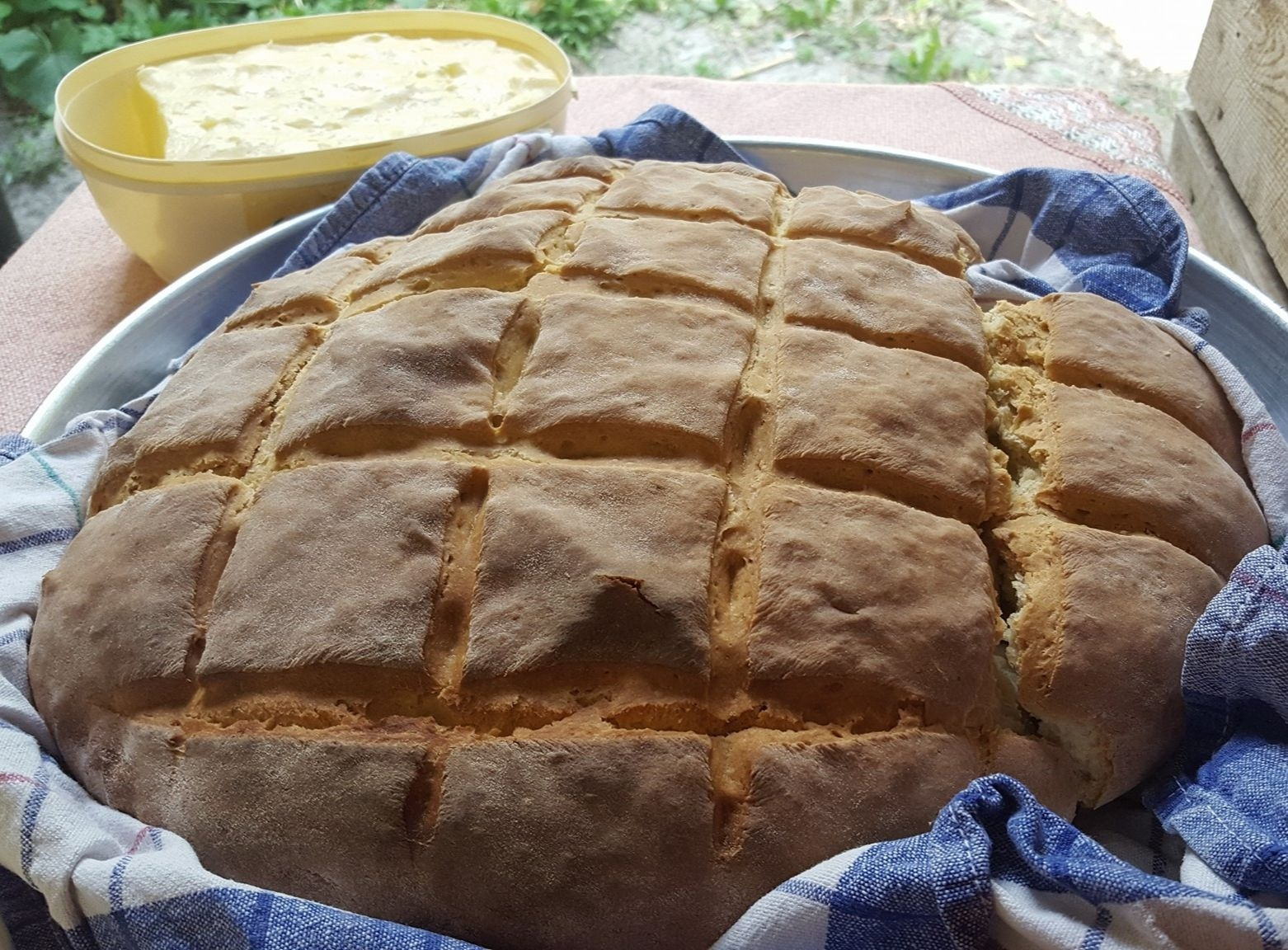 Bukë shtëpie e ngrohtë dhe gjalpë i freskët.